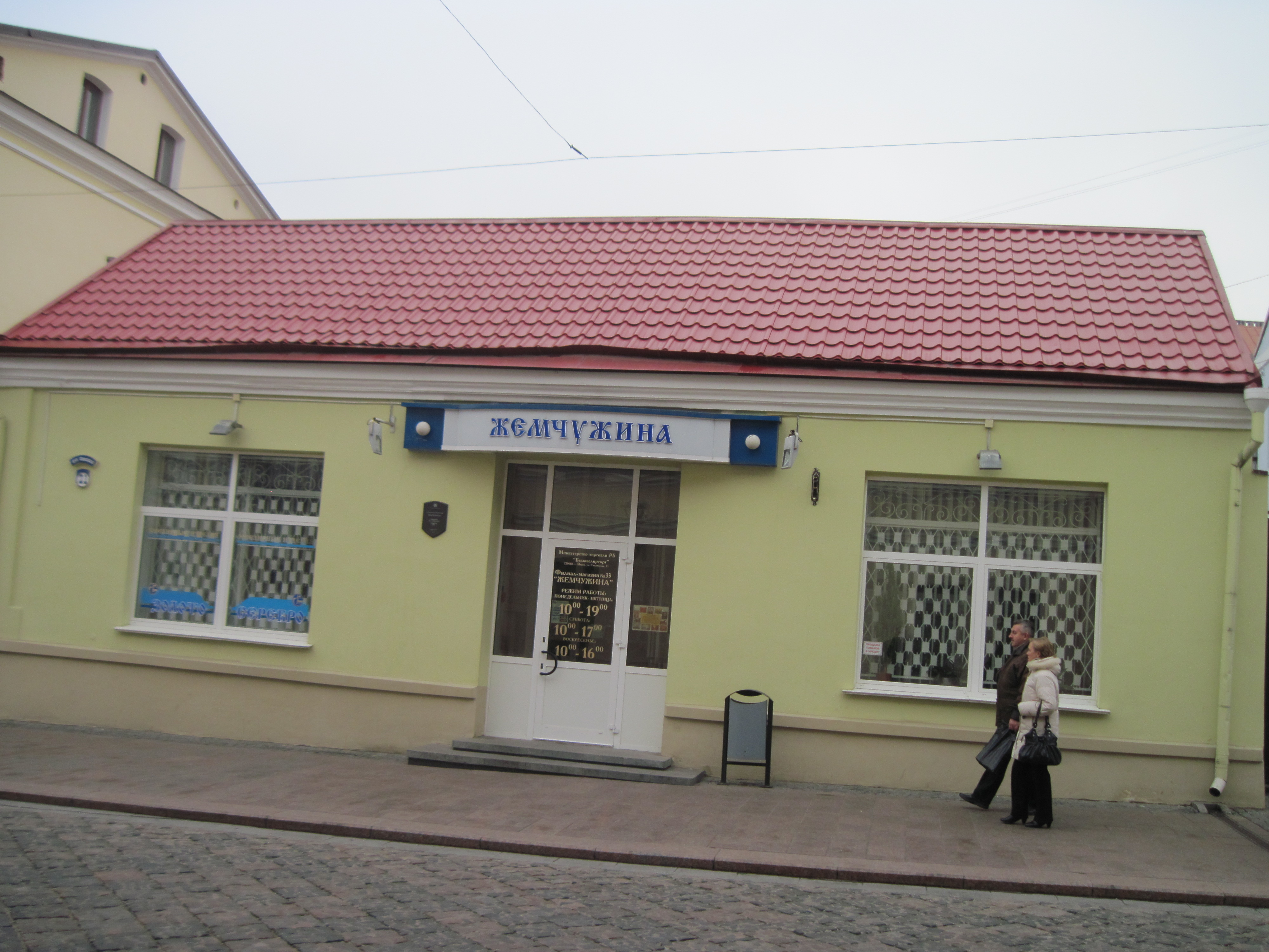 Беларуская (тарашкевіца): Будынак дома. Вул. Савецкая, 21, Гродна